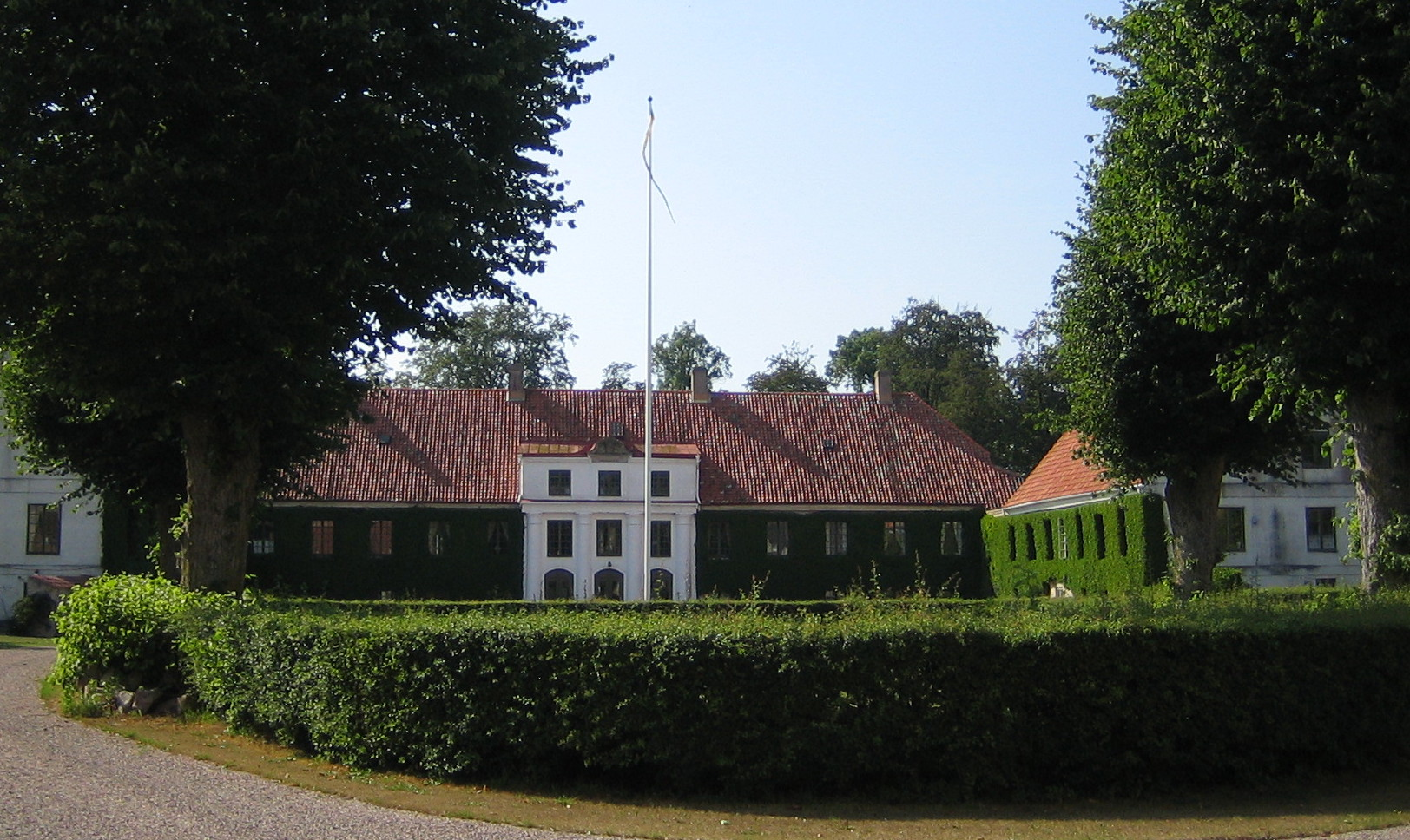 Belteberga manor, Skåne, Sweden